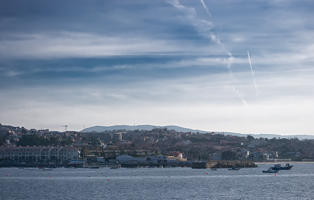 Porto de Canido, Oia, Vigo, Galiza